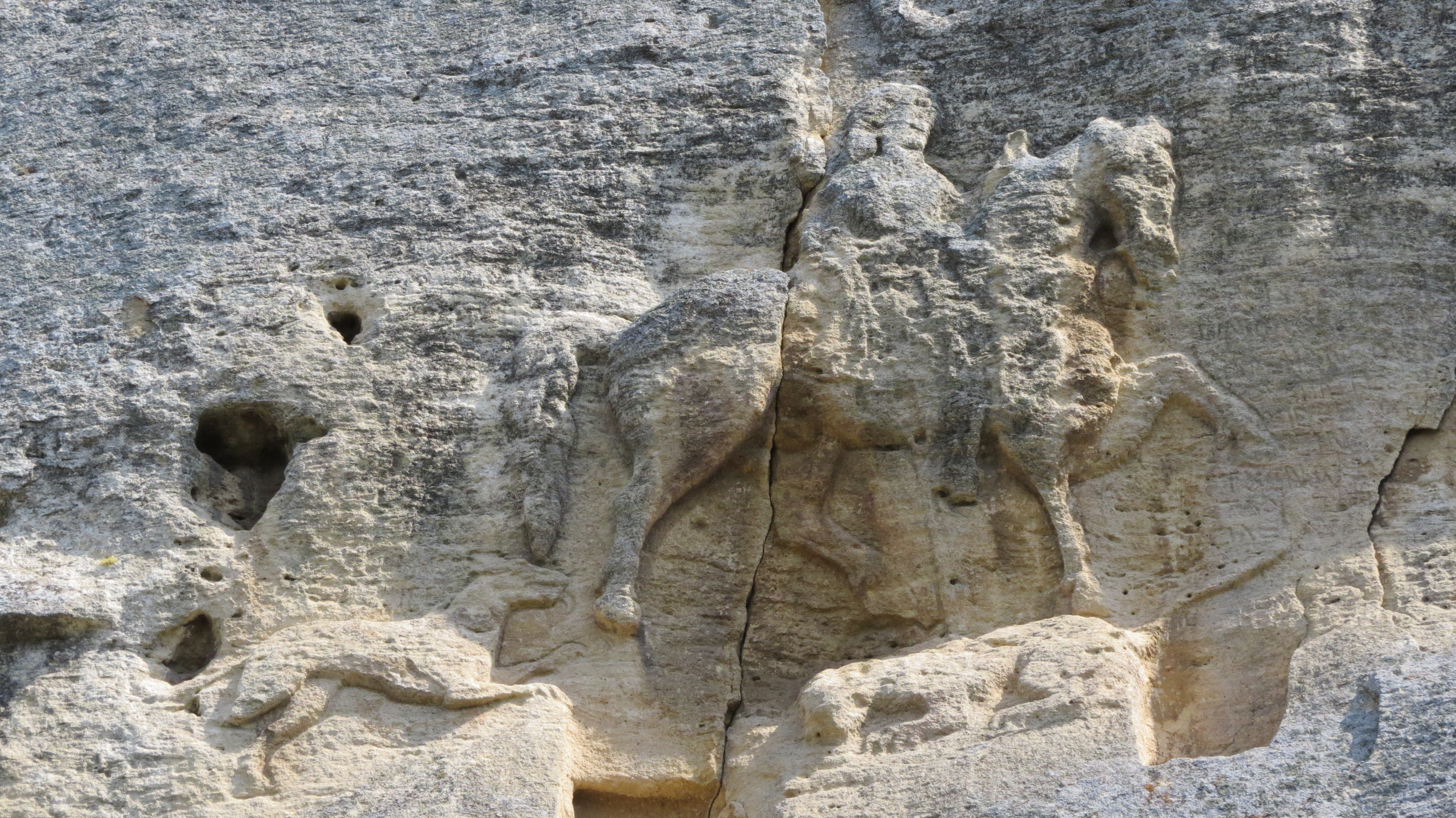 Zgodnjesrednjeveški skalni relief konjenika na Madarski planoti vzhodno od Šumena v severovzhodni Bolgariji